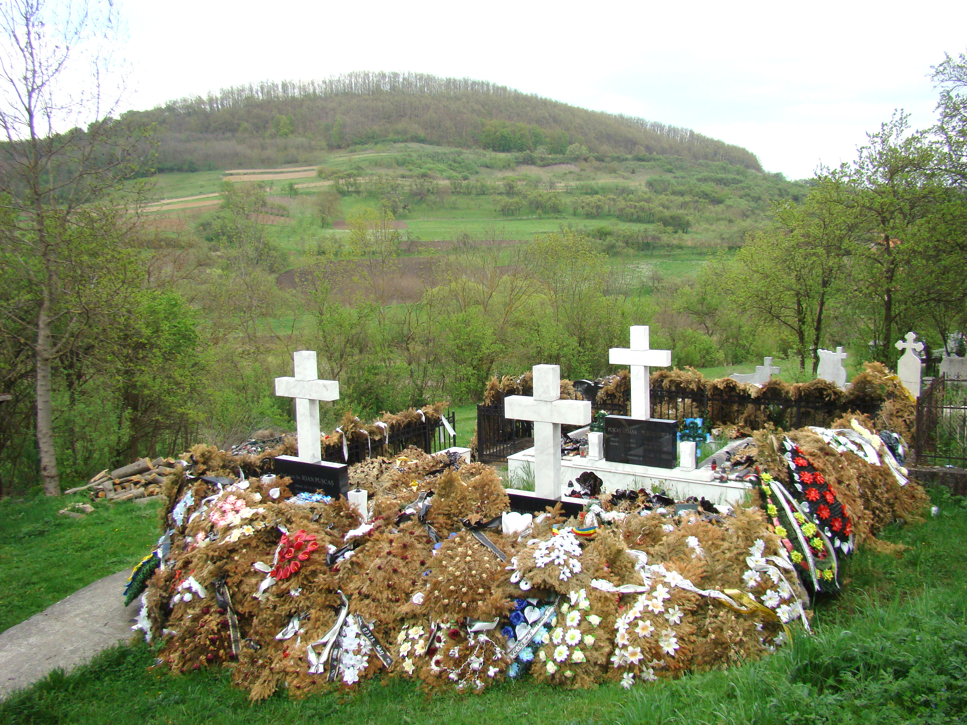 Biserica „Adormirea Maicii Domnului” din Treznea, județul Sălaj